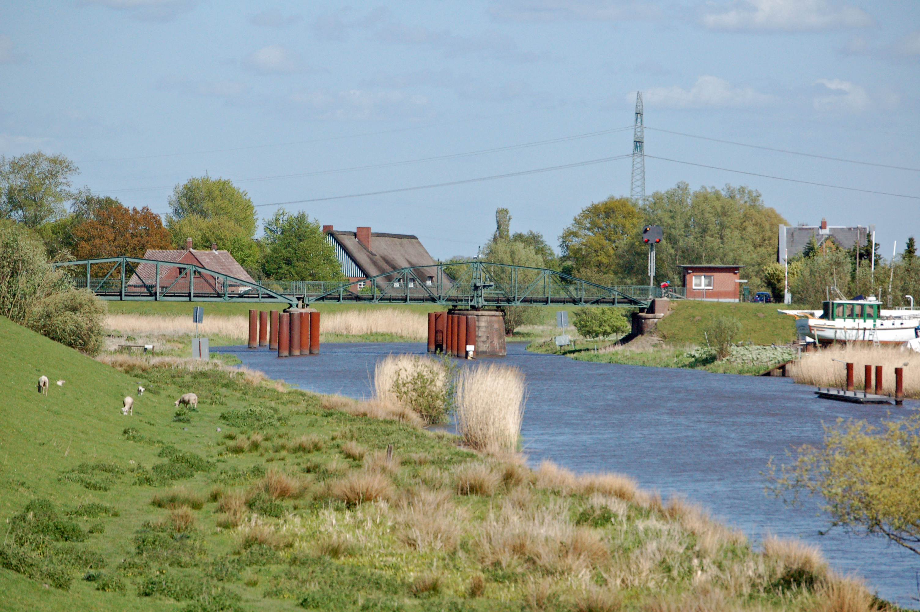 Die Klevendeicher Drehbrücke von der "Aalkate" aus gesehen.